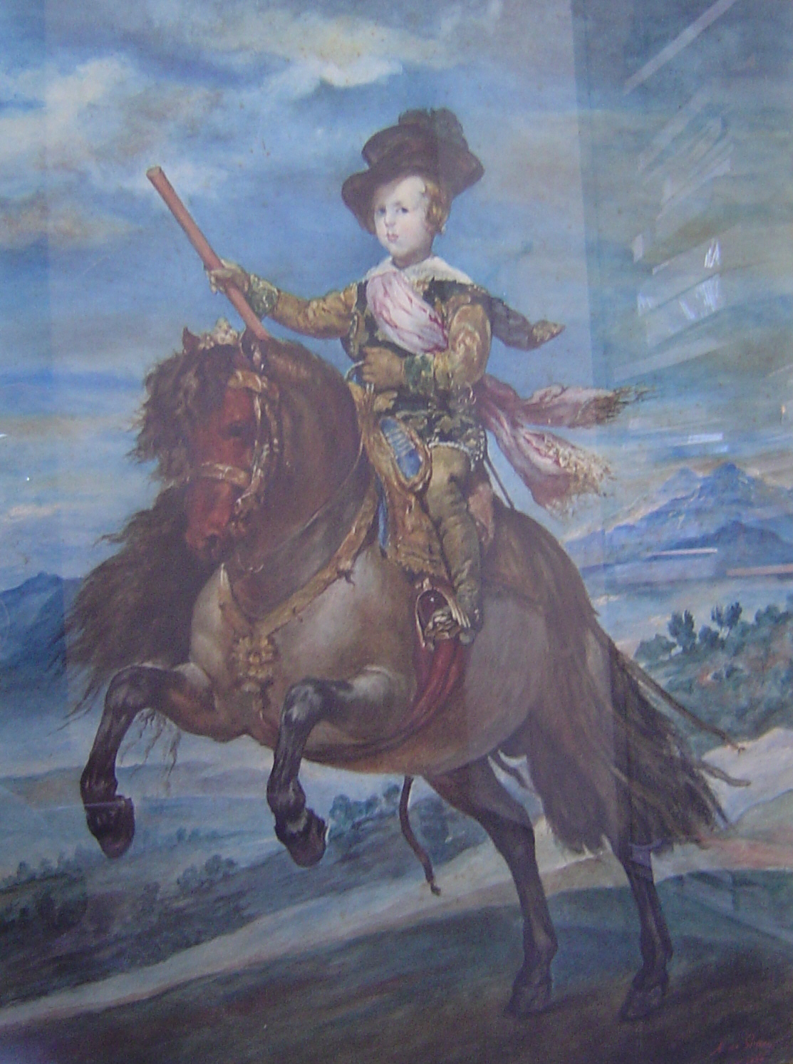 Imatge de l'Infant Hasburg a cavall. Figura d'un nen a cavall vestit de gala amb una banda blanca amb uns rivets vermells. Porta un barret negre amb plomes i un bastó de mando. Cel nuvolat amb tons blavosos. El cavall s'aguanta amb les potes traseres. És una còpia d'una obra de Velázquez